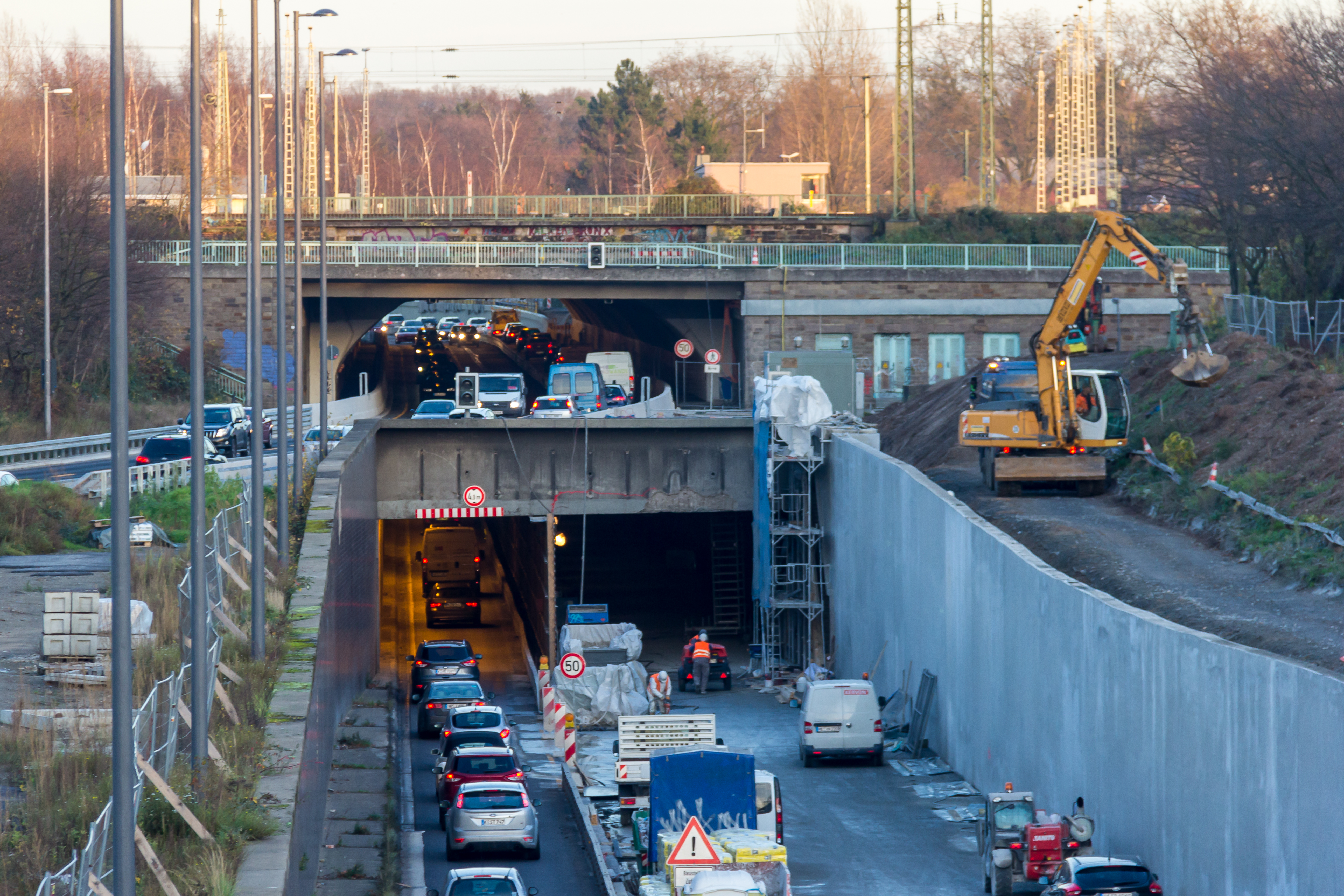 Tunnel Kalk, Köln Stadtautobahn B55a. Blick stadtauswärts. Der Doppelstocktunnel wird spurweise saniert, die geänderte Verkehrsführung ist erkennbar. Unterquert wird der Güterbahnhof Köln-Kalk Nord